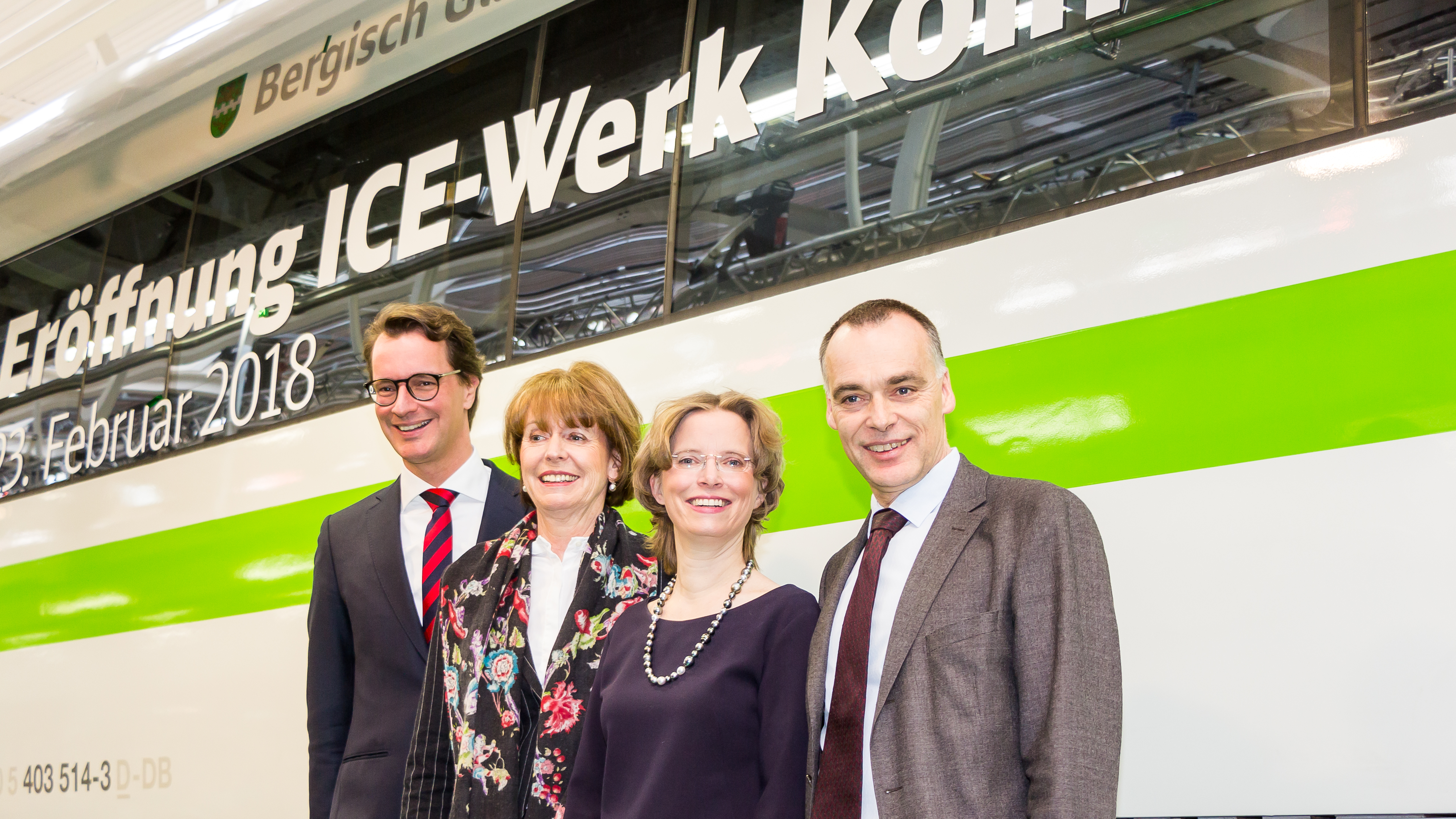 Eröffnung des ICE-Instandhaltungswerkes der Deutschen Bahn in Köln-Nippes Gruppenfoto vor dem ICE 3: Hendrik Wüst, Verkehrsminister des Landes Nordrhein-Westfalen Henriette Reker, Oberbürgermeisterin von Köln Birgit Bohle, Vorsitzende des Vorstands der DB Fernverkehr AG Berthold Huber, Vorstand Verkehr und Transport der Deutschen Bahn AG